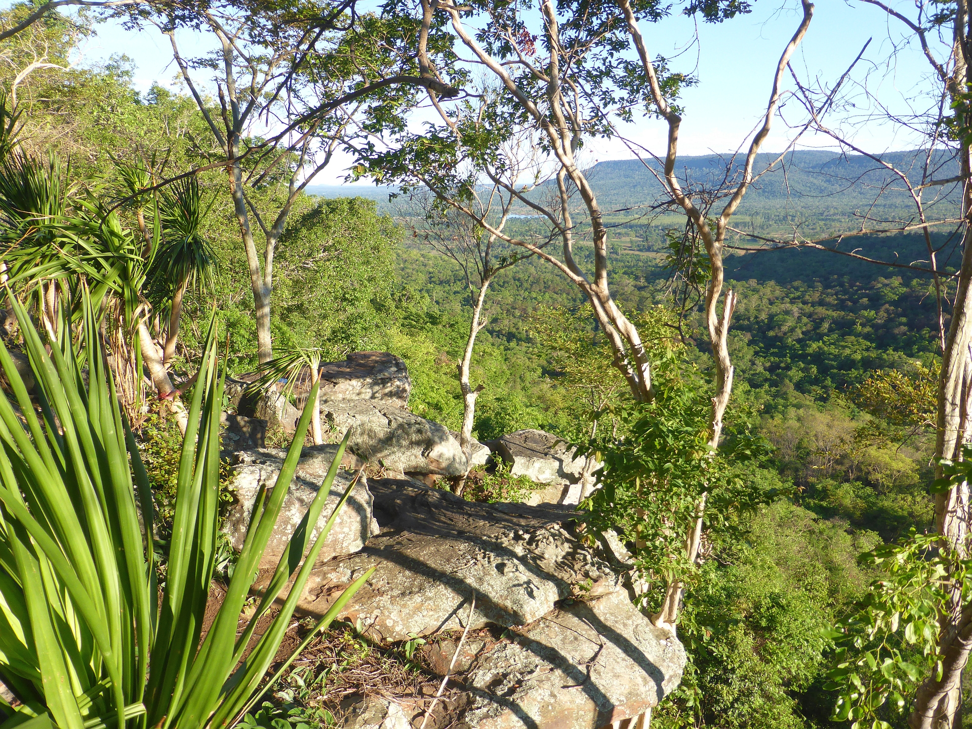 Nationalpark Ta Phraya (Provinz Buriram und Provinz Sa Kaeo), 18.06.2016